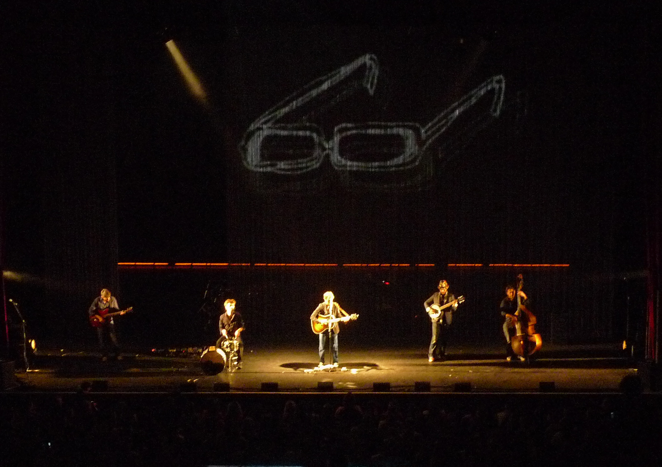 Concert de Renan Luce à l'Olympia le 13 mai 2010.